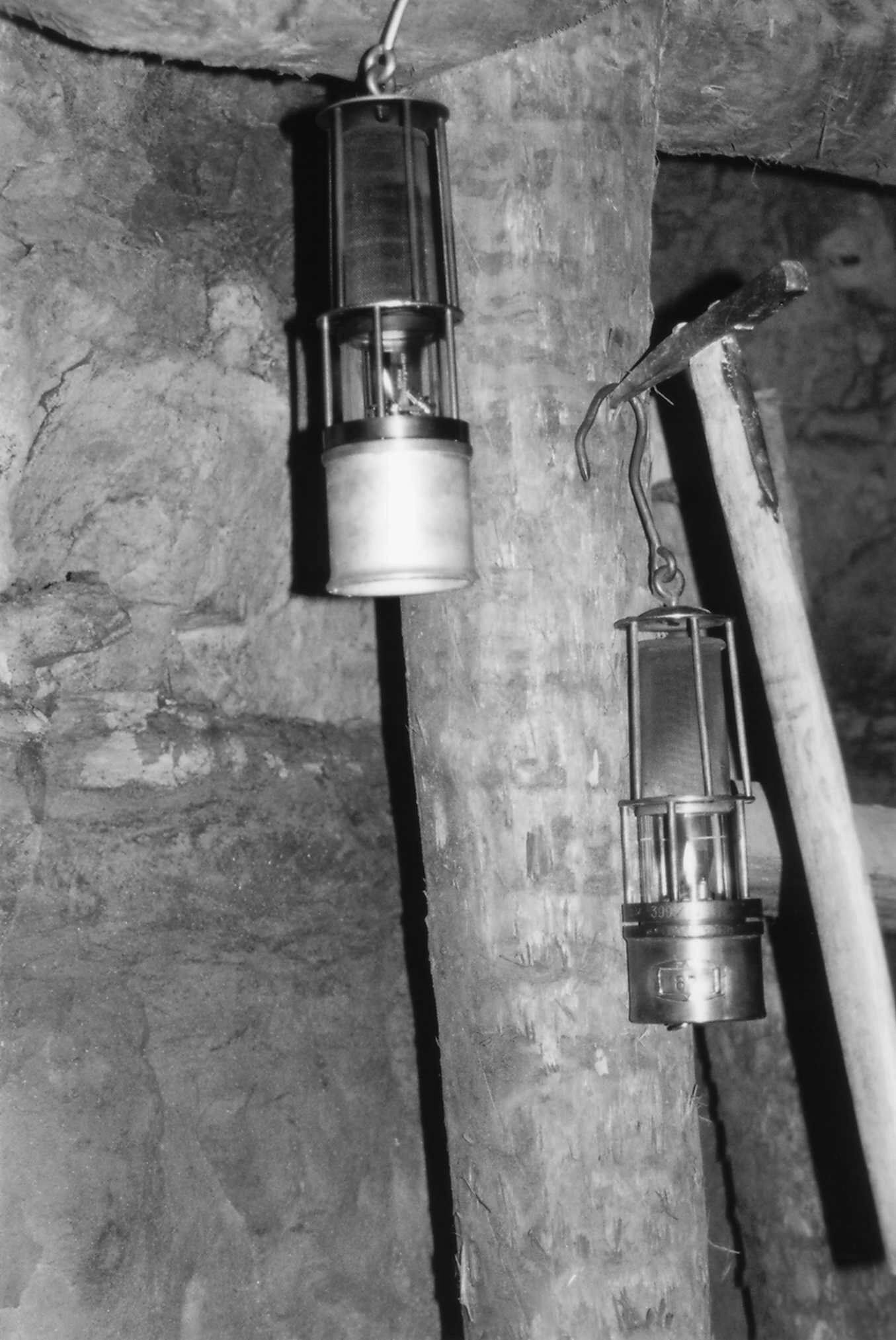 Sicherheitslampen, selbst fotografiert. Links eine Lampe von Friemann & Wolf Duisburg, Modell 20502 mit elektrischer Zündvorrichtung; rechts eine Lampe Modell LB-1 von Elektrometal/Pl, diese ist baugleich mit dem Modell 400n der Grubenlampenwerke Zwickau.